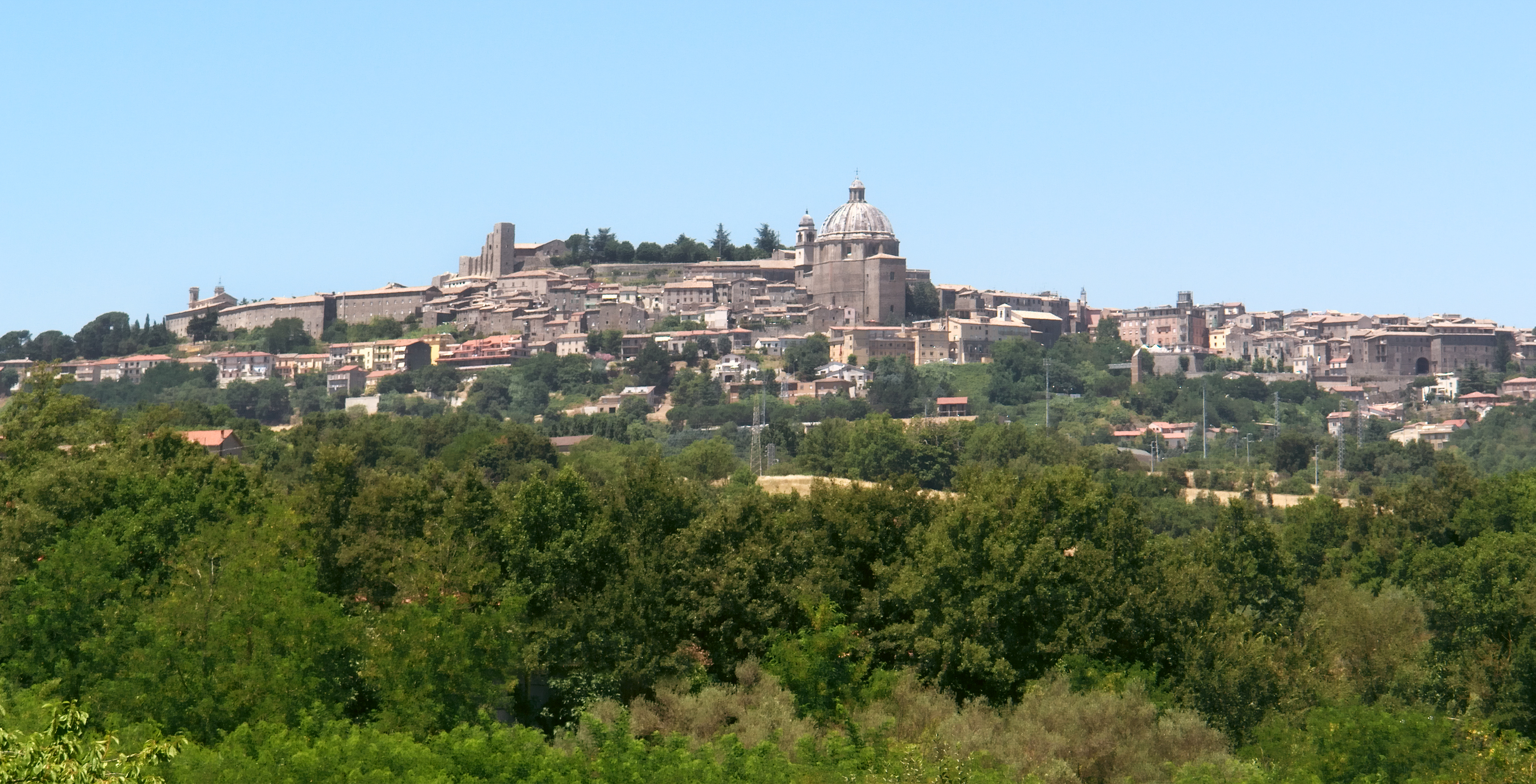 Montefiascone (Vt) - Panorama